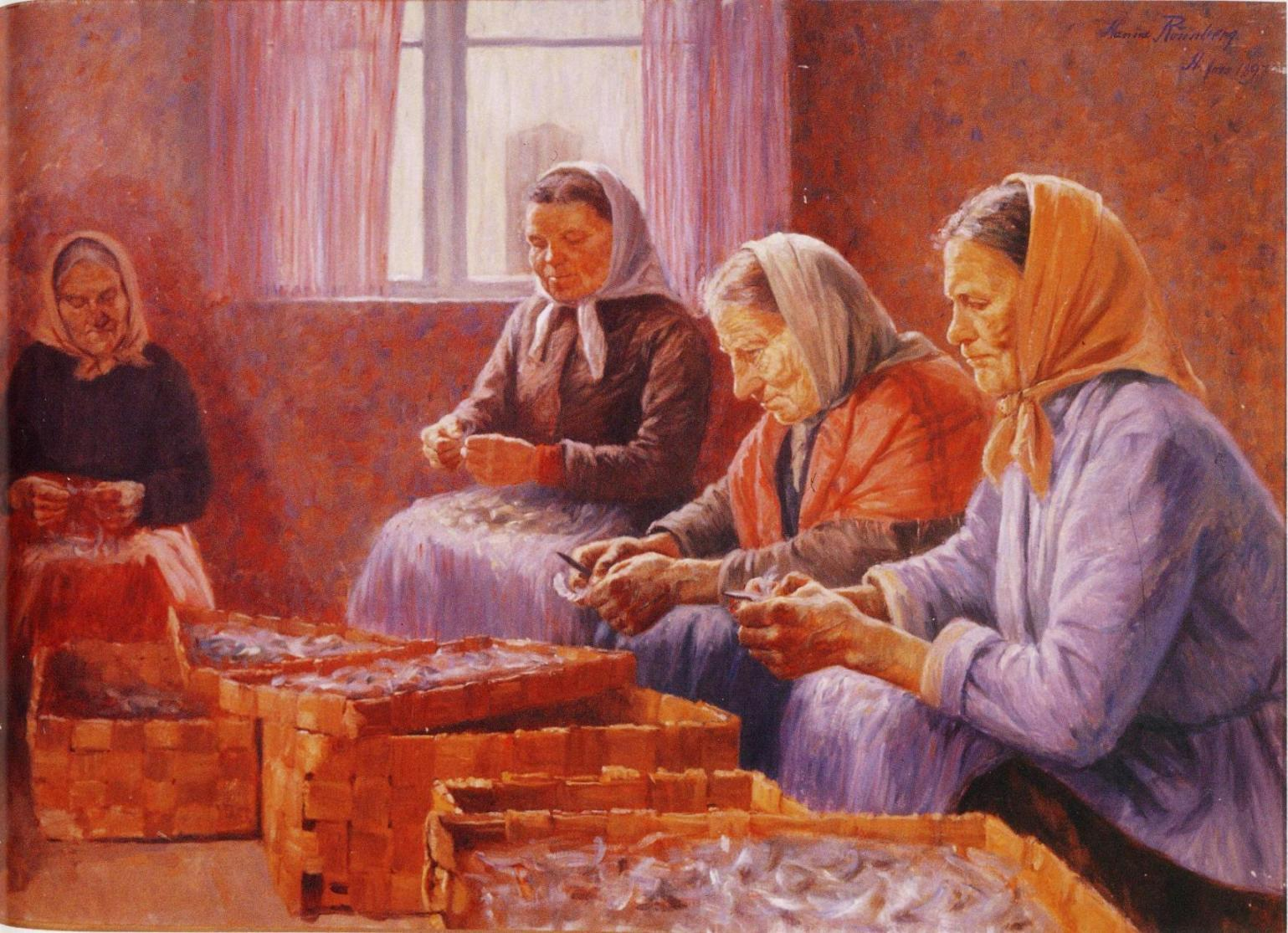 Hanna Rönnbergin maalaus, kuuluu yksityiskokoelmaan.